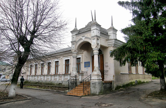 Смілянський_краєзнавчий_музей.jpg: Краєзнавчий музей у Смілі